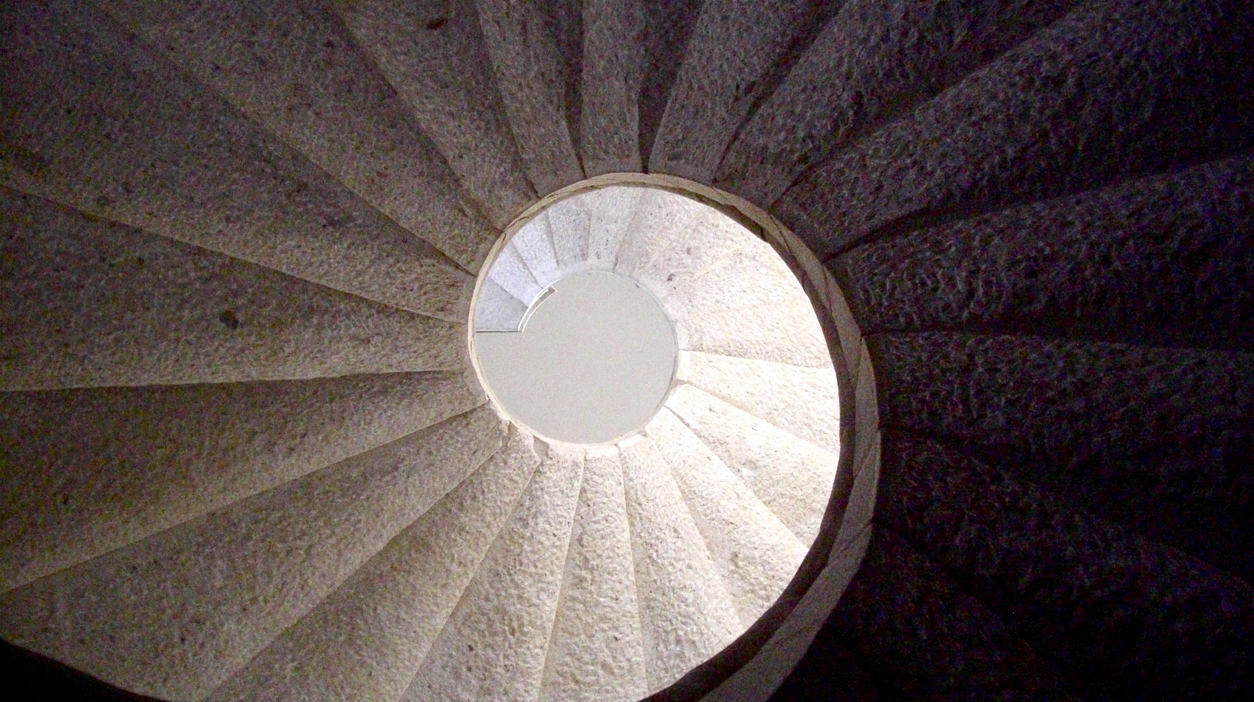 Scalone della certosa di Padula.